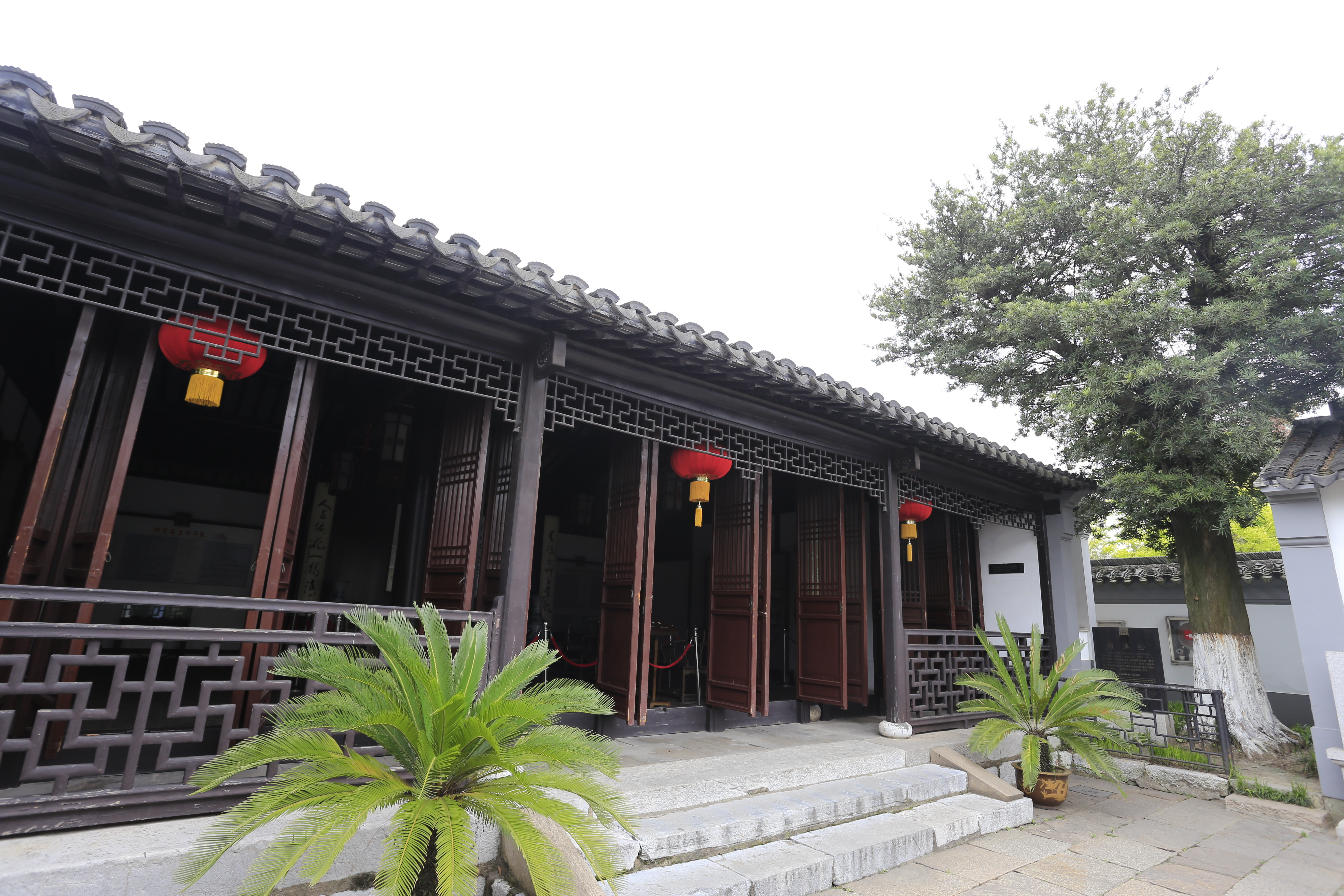 徐霞客故居及晴山堂石刻—— 第二进崇礼堂左前方的罗汉松